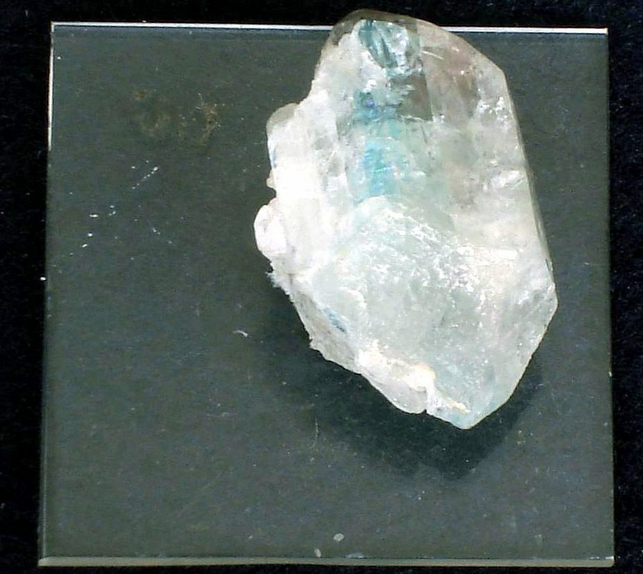 A 4 cm crytal of Euclase from Equador, Rio Grande do Norte, Brazil